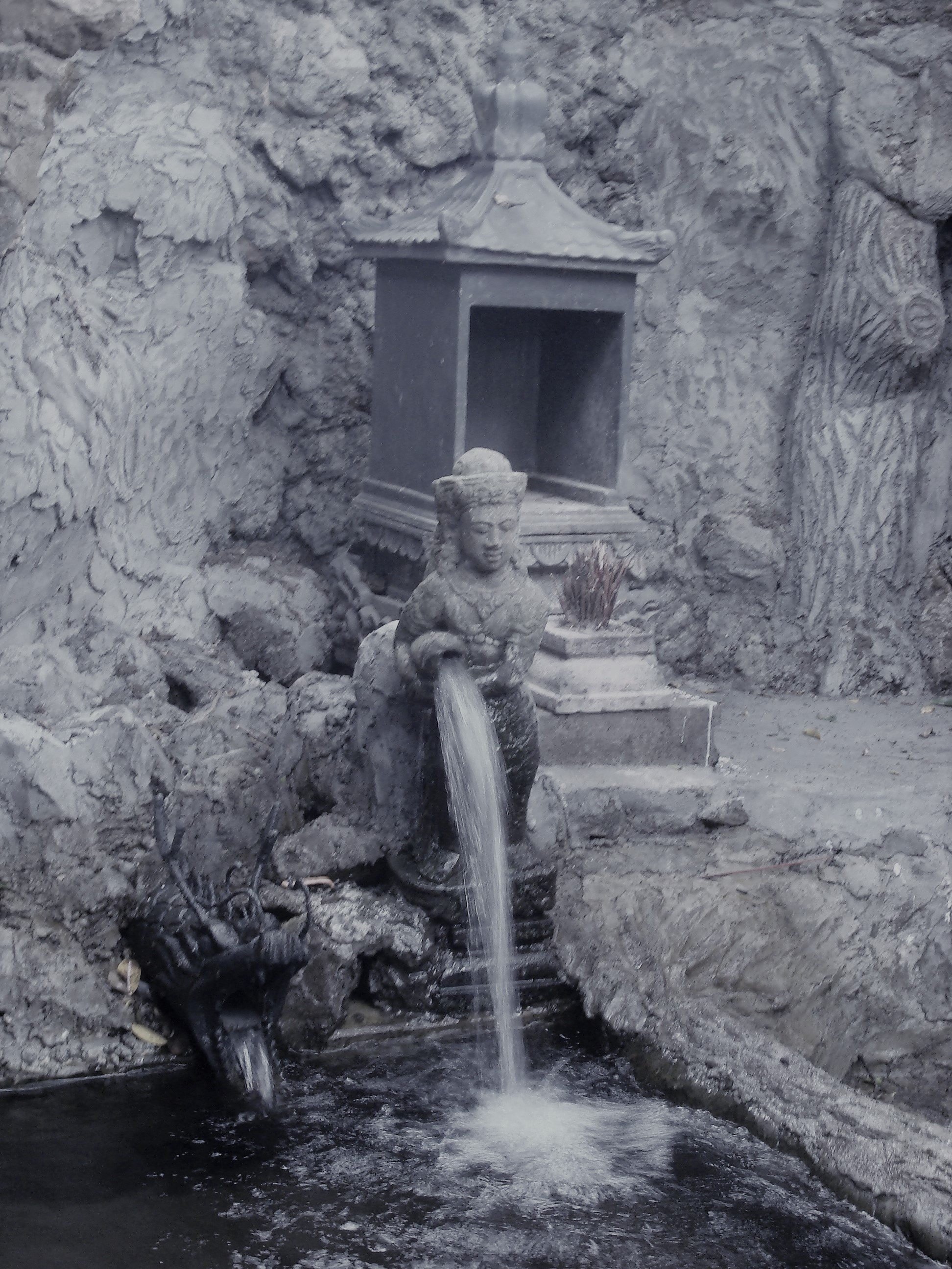 Eine Heilige Quelle beim Candi Sumberawan